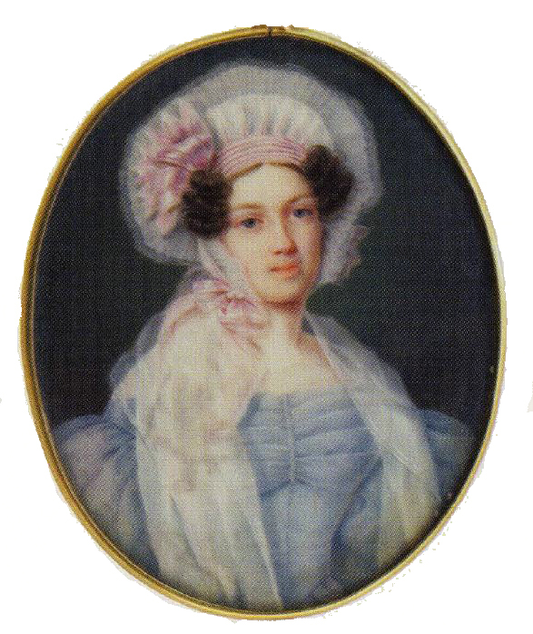 Юсупова Зинаида Ивановна (1809-1893) урожд. Нарышкина